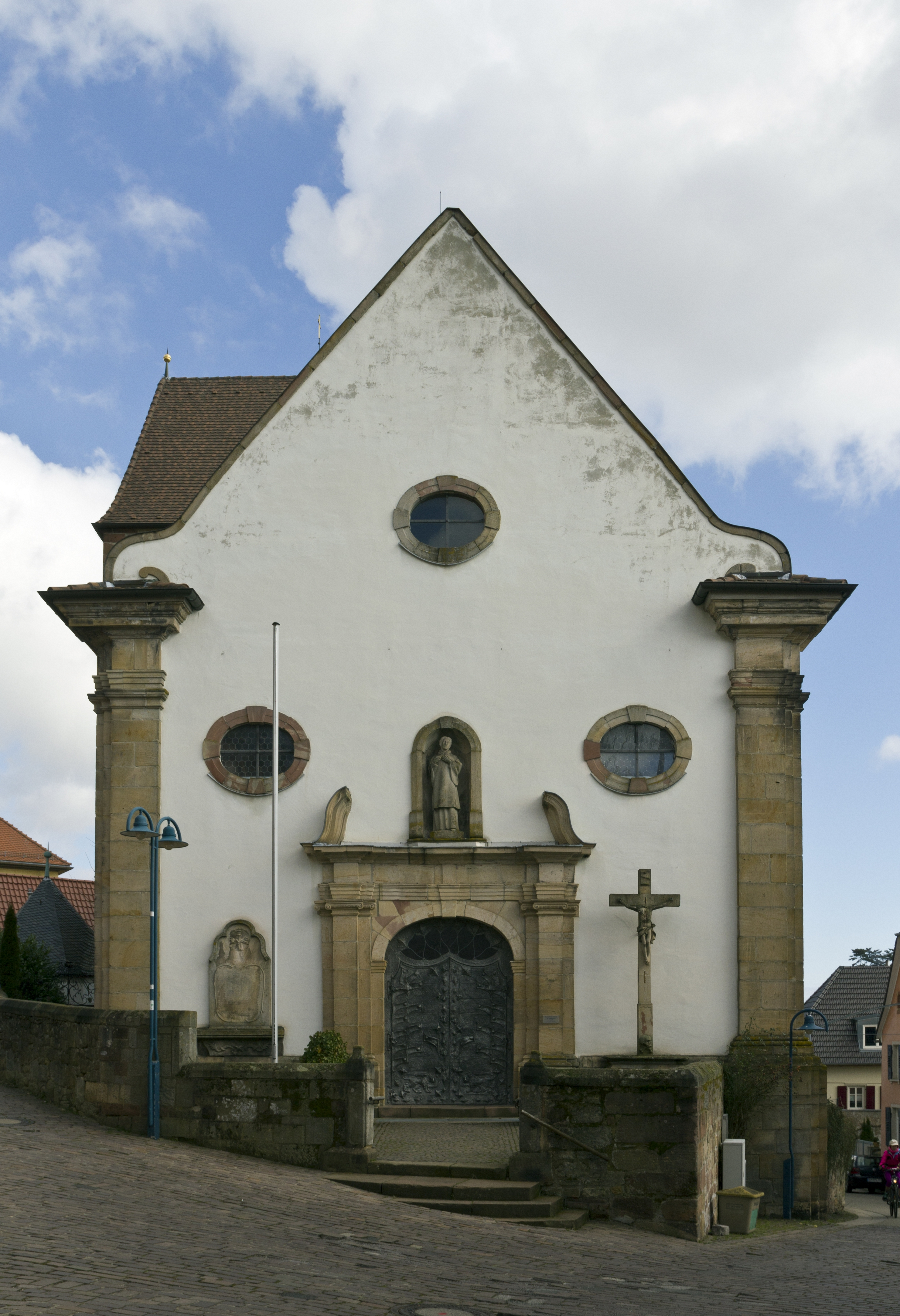 Gleisweiler, katholische Pfarrkirche St. Stephan